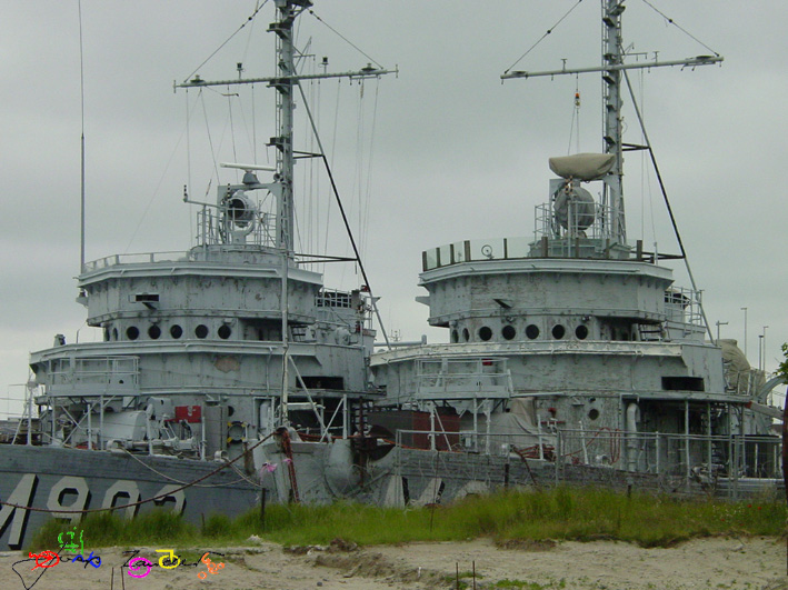 Oude marineschepen.